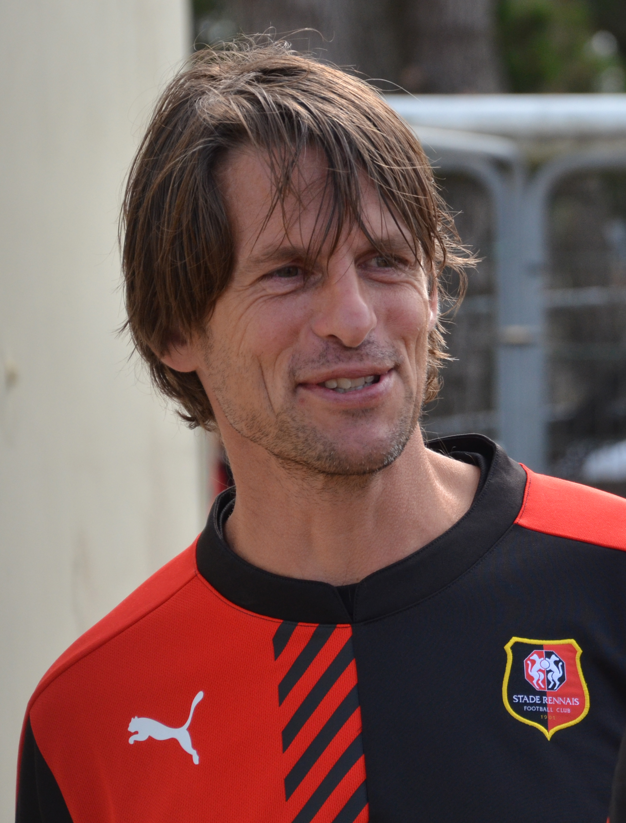 Photographie prise lors du match opposant le Stade rennais au Havre AC en amical au stade Paul-Audrin de Dinard le 8 juillet 2015. Ici, Frédéric Née.